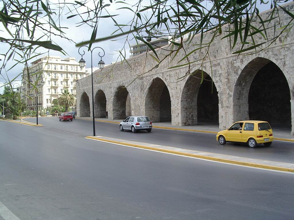 Gran muralla veneciana a Heràkleion, foto feta per J. Ollé l'agost del 2005